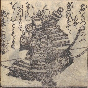 佐藤継信